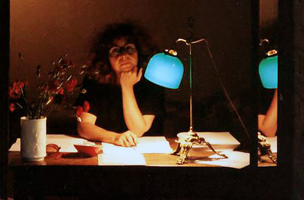 L'écrivaine et scénariste française Marie-France Briselance écrivant son roman "Massinissa le Berbère" en 1989